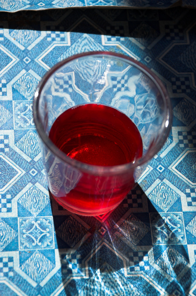 Karkadè